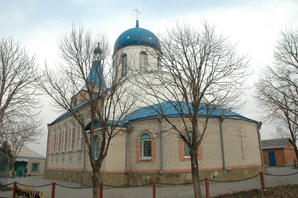 Изначальный деревянный храм построен и освящен 5 марта 1888 года Александровско-Грушевским благочинным, священником Антонием Манохиным. В 1983 году храм был реконструирован, от существующих стен деревянного храма отступили на 2 метра и возвели добротные кирпичные стены с арочным сводом. Завершилась реконструкция чином Великого Освящения 22 мая 1998 года архиепископом Ростовским и Новочеркасским Пантелеимоном (Долгановым).